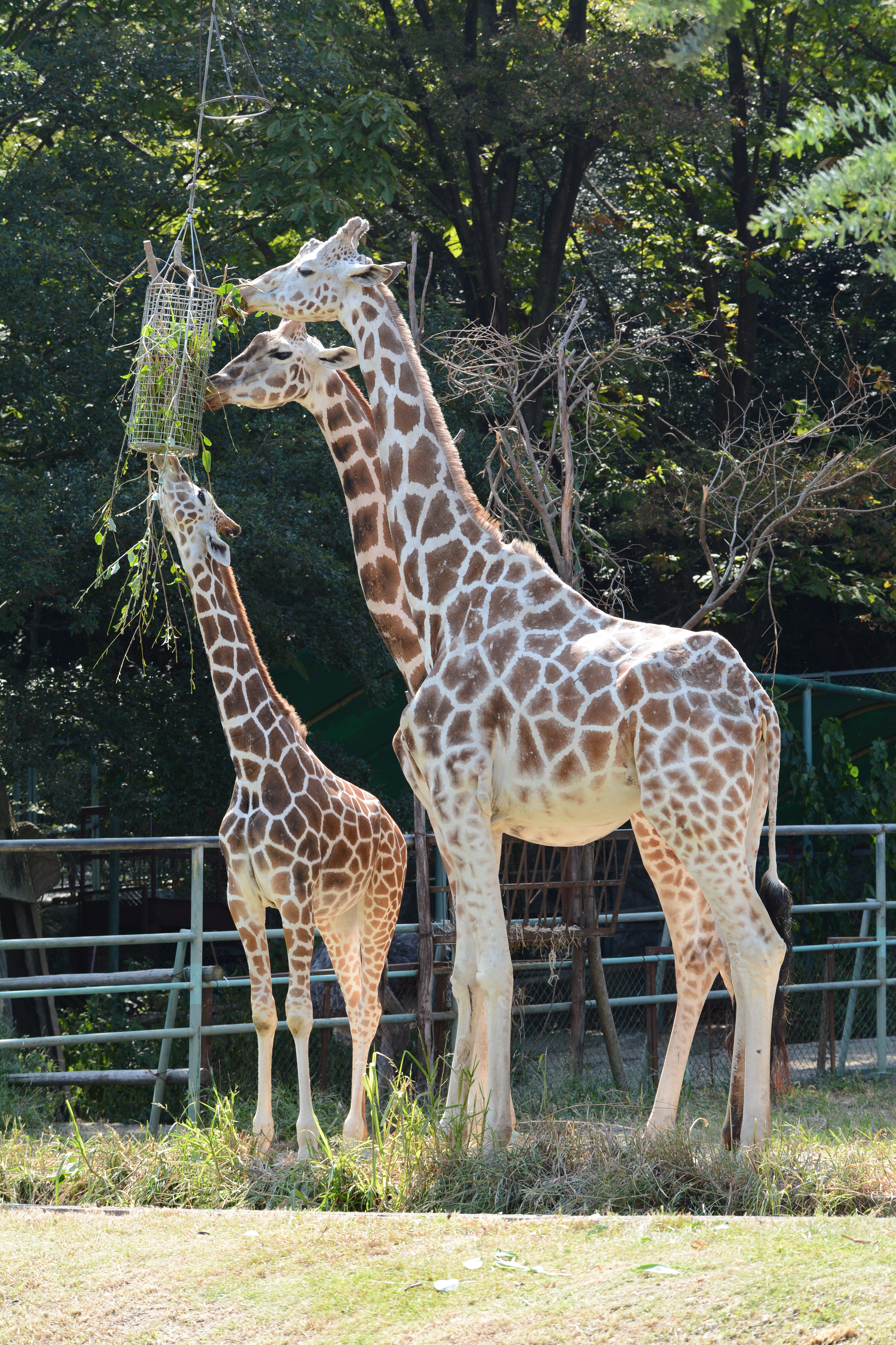 アミメキリン（東山動植物園）